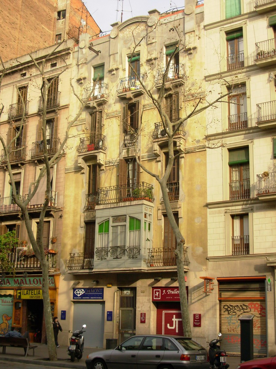 Magatzem per a Rosa Espluga a la Ronda Sant Antoni 22 (Barcelona-Catalunya), obra de Joaquim Raspall de 1907.